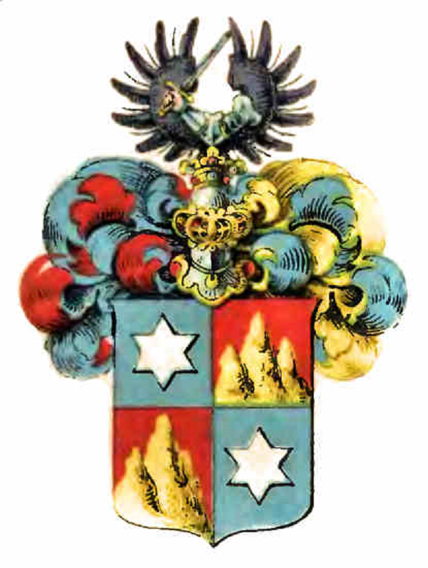 Wappen derer von Wallenberg